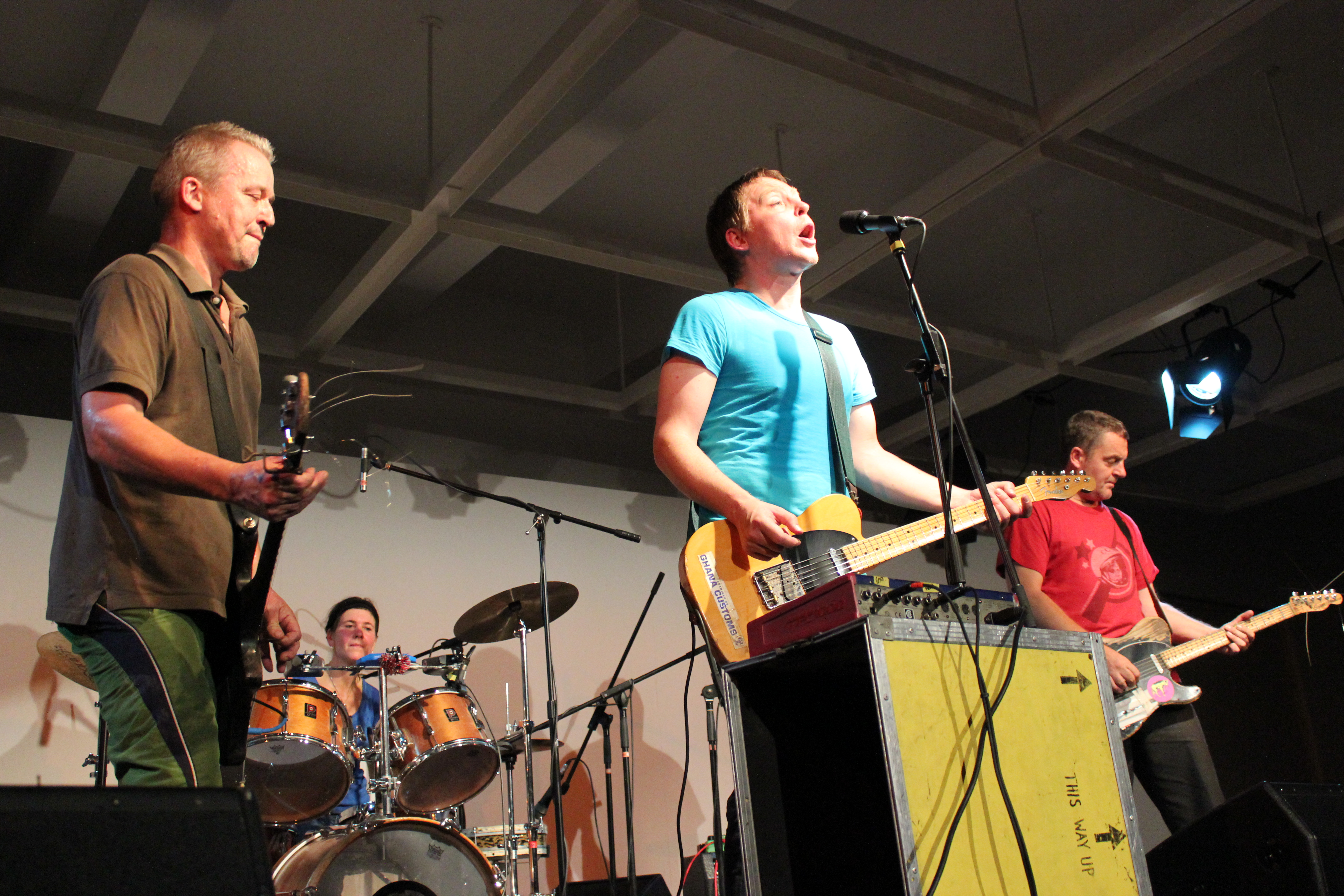 A banda neerlandesa The Ex na Coruña.